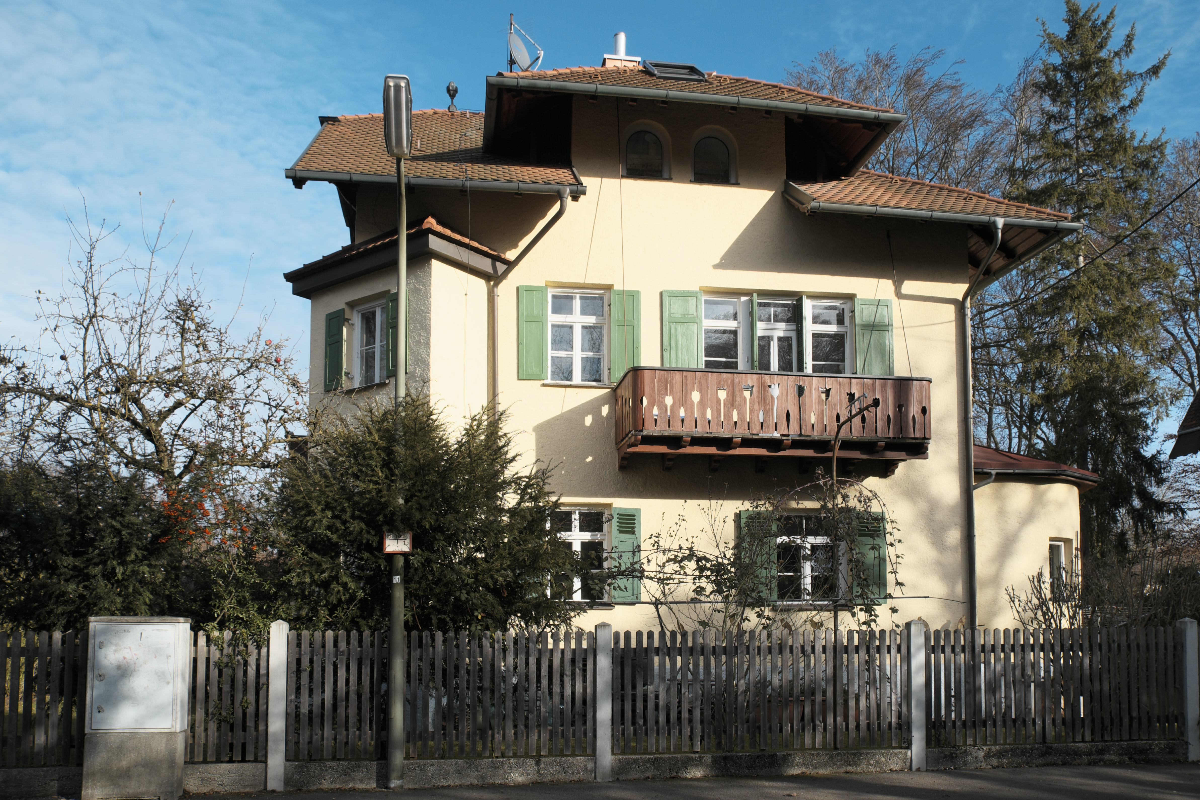 Villa in der Maria-Eich-Straße 49 in Pasing im Stadtbezirk Pasing-Obermenzing in München (Bayern/Deutschland)